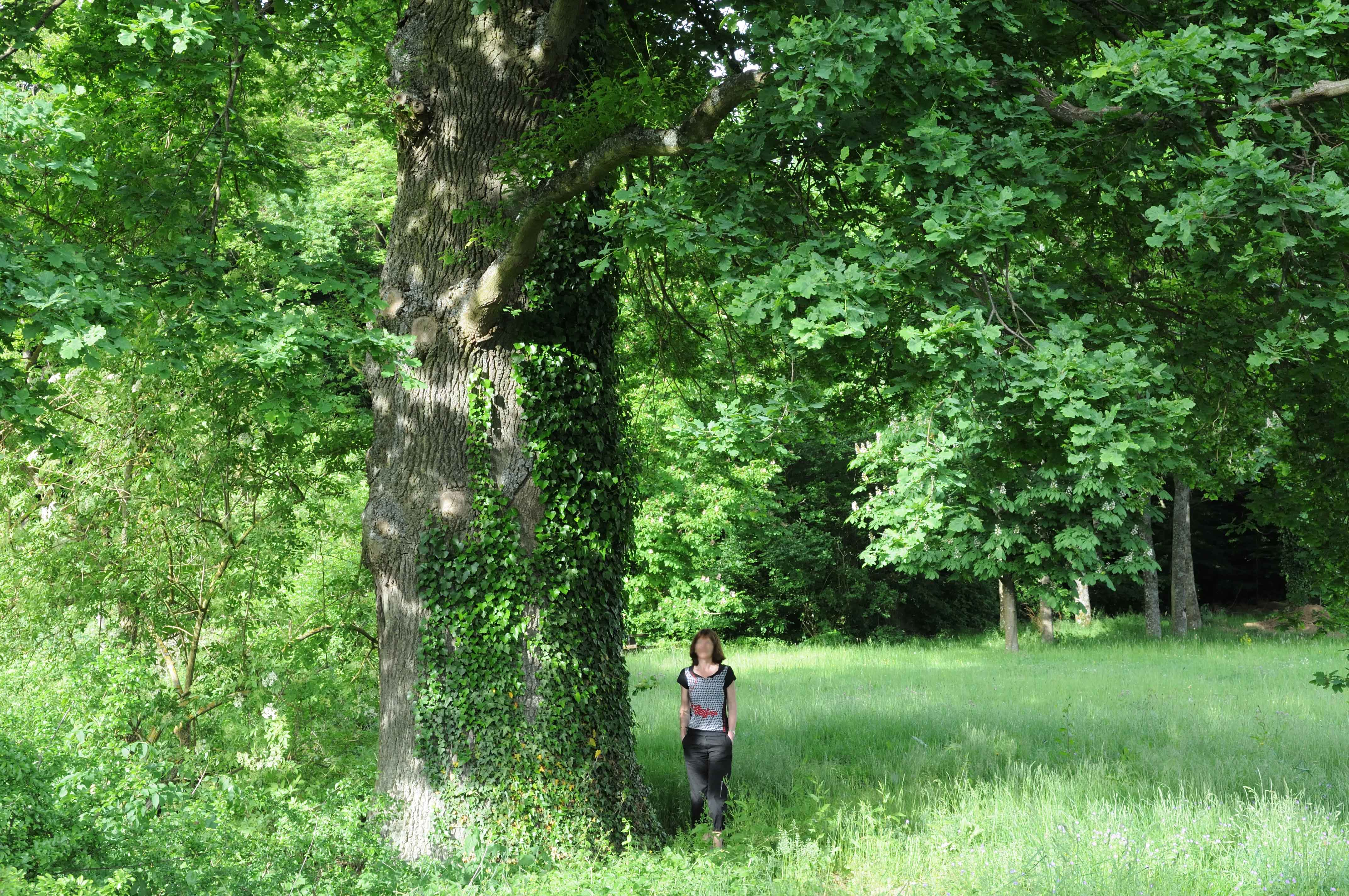 Le chêne pédonculé remarquable à Moutfort (Luxembourg)